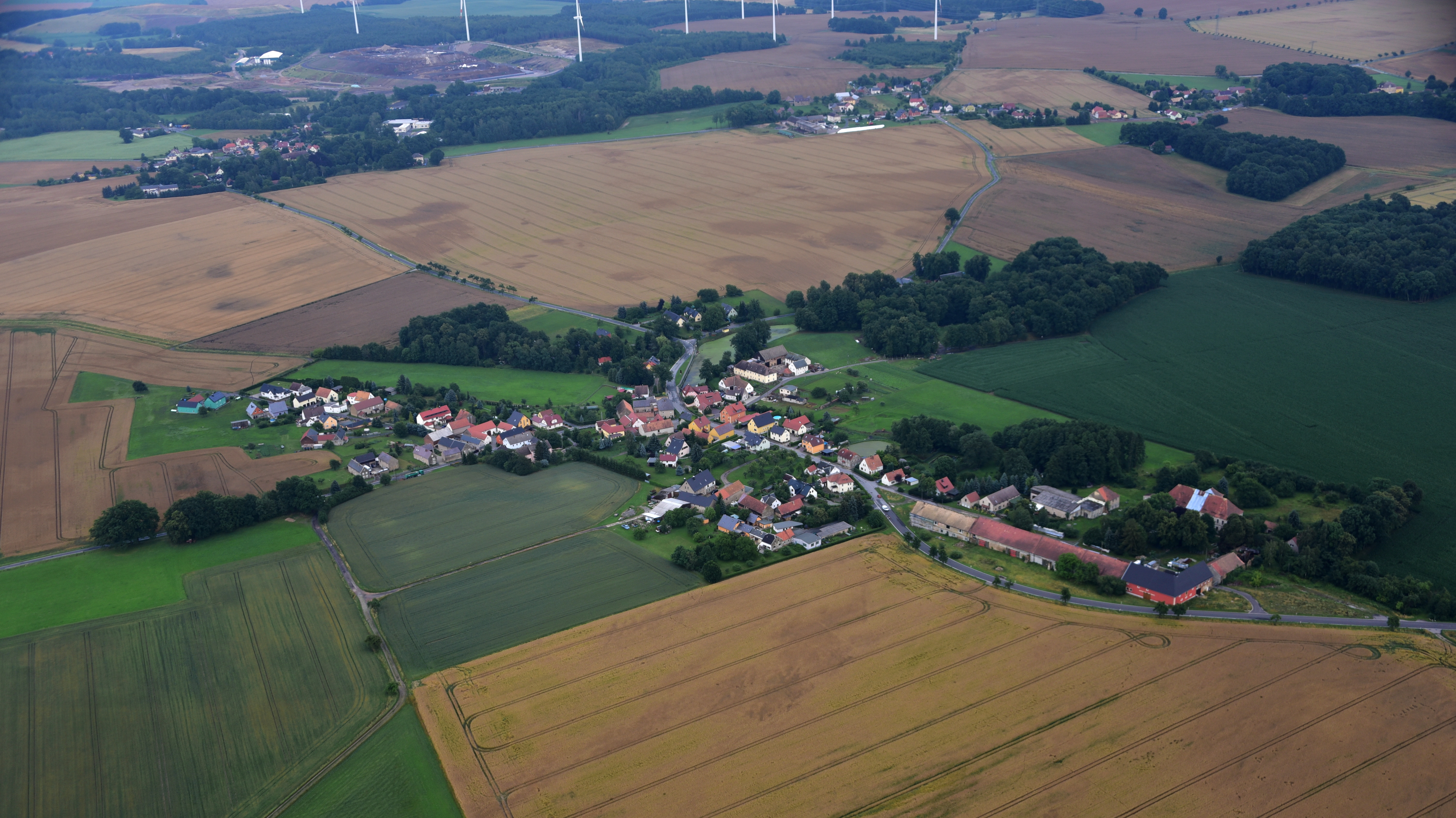 Jeßnitz (Puschwitz), Luftaufnahme (2017) Hornjoserbsce: Powětrowy wobraz Jaseńcy (2017)